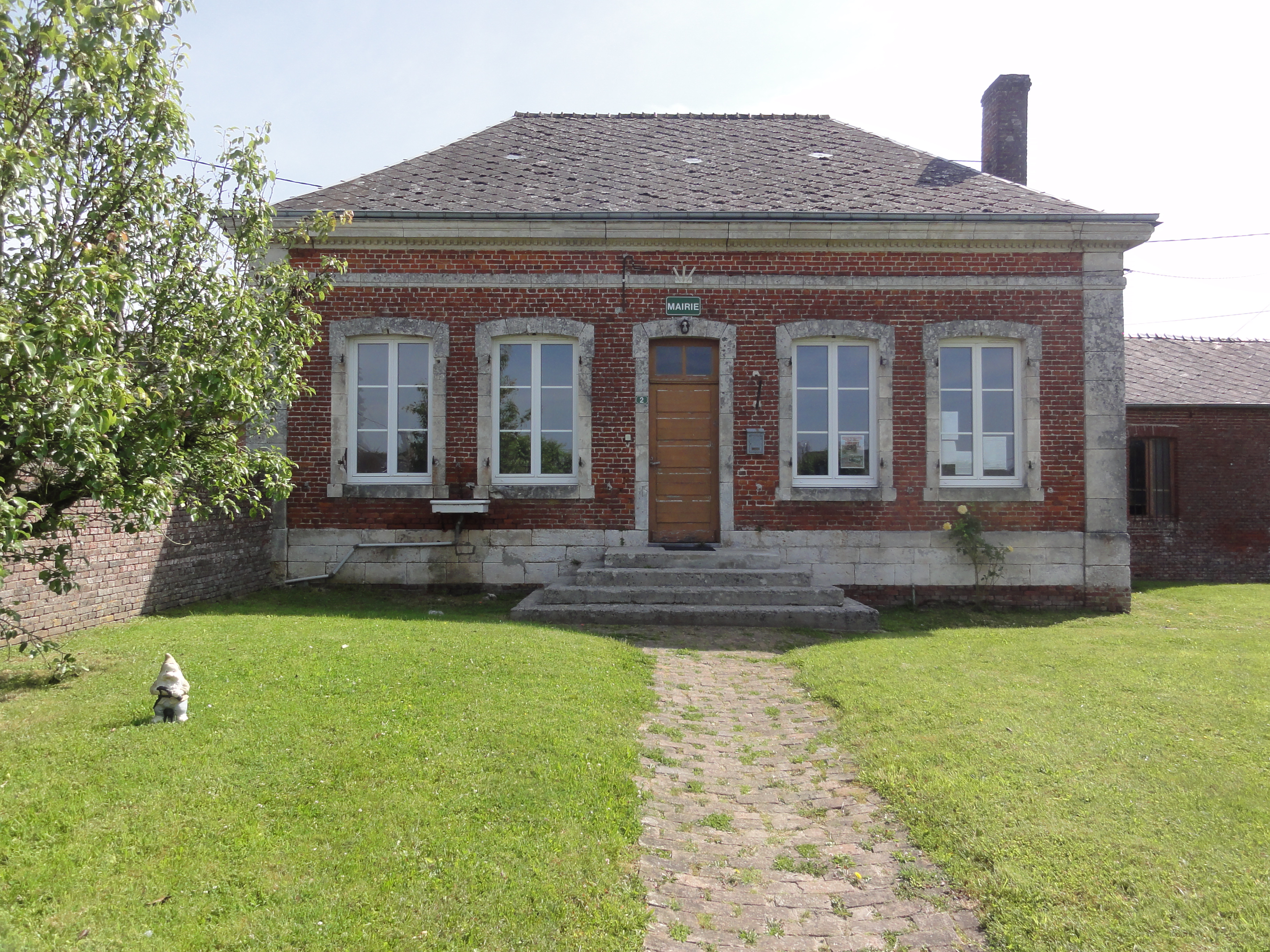 Les Autels (Aisne) mairie